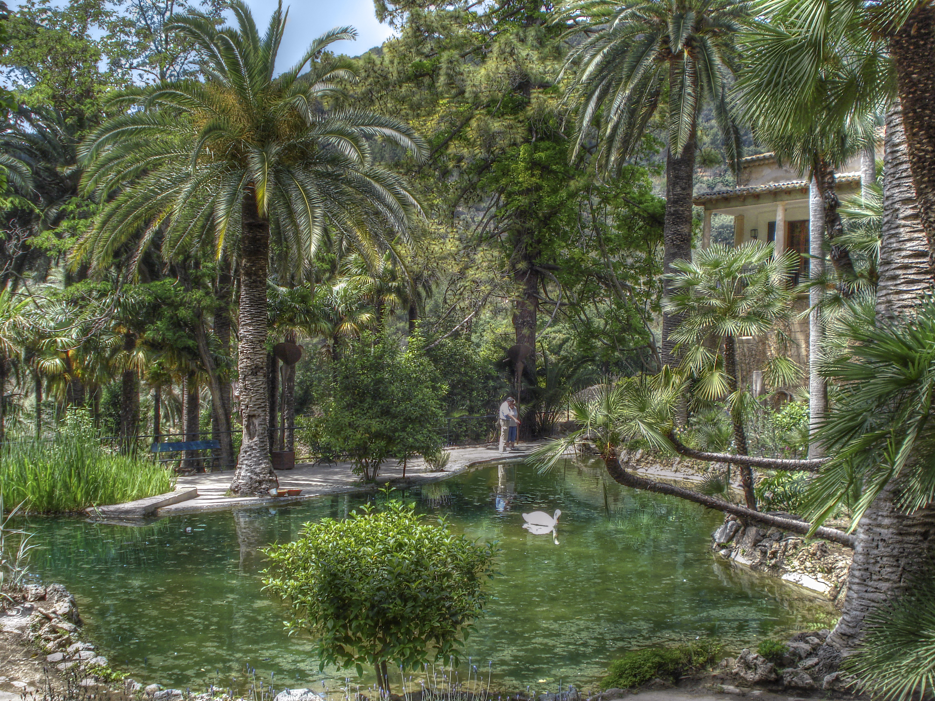 Gärten von Alfabia, Mallorca